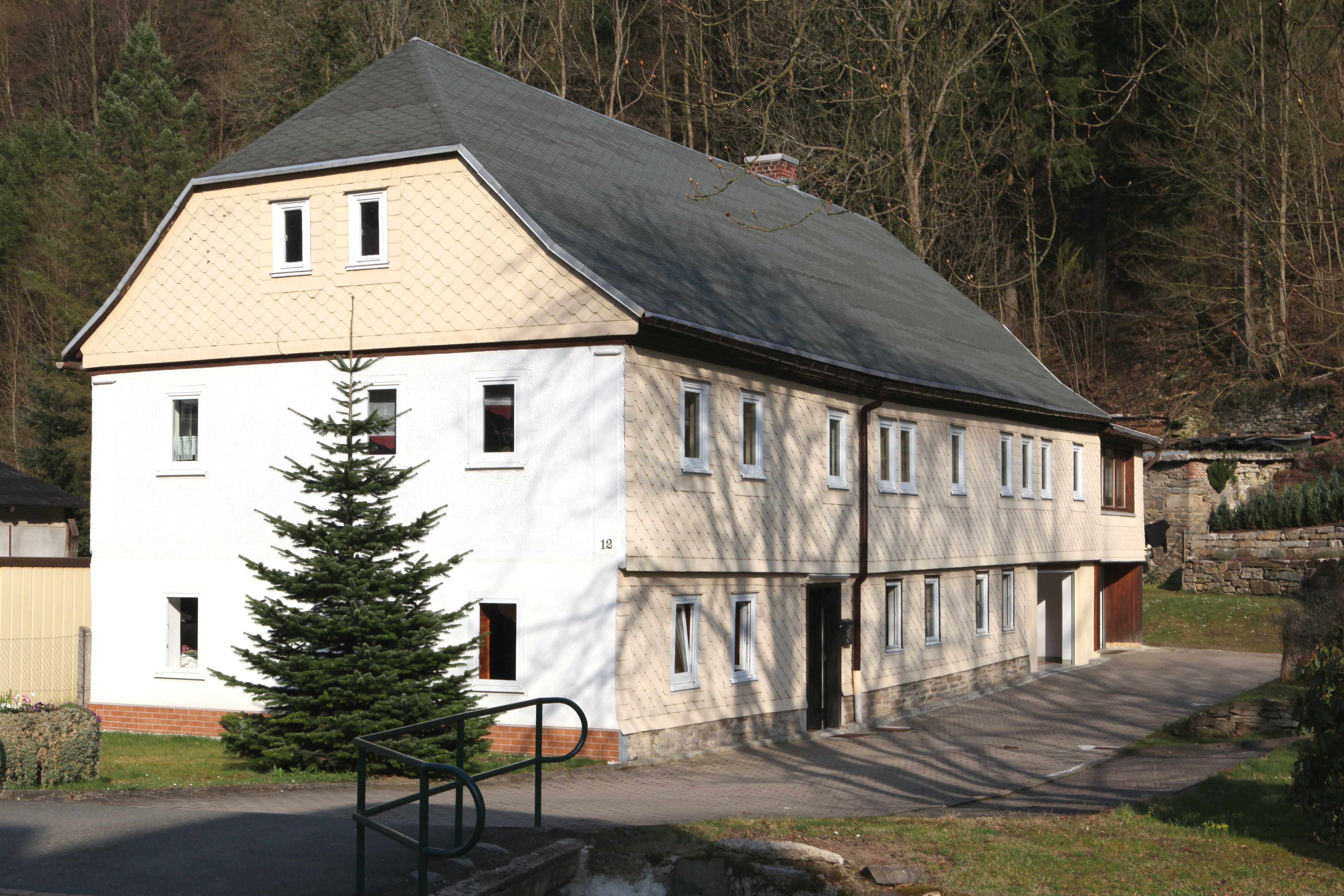 Rohrbach-Wohnhaus